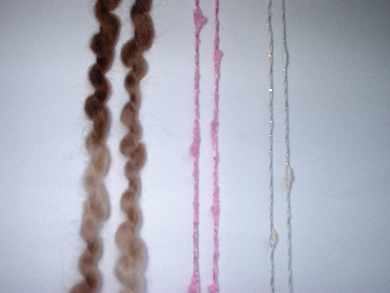 Effektgarne:(rechts) Boucle, (Mitte) Noppengarn, (rechts) Boucle mit metalisiertem Polyesterbändchen